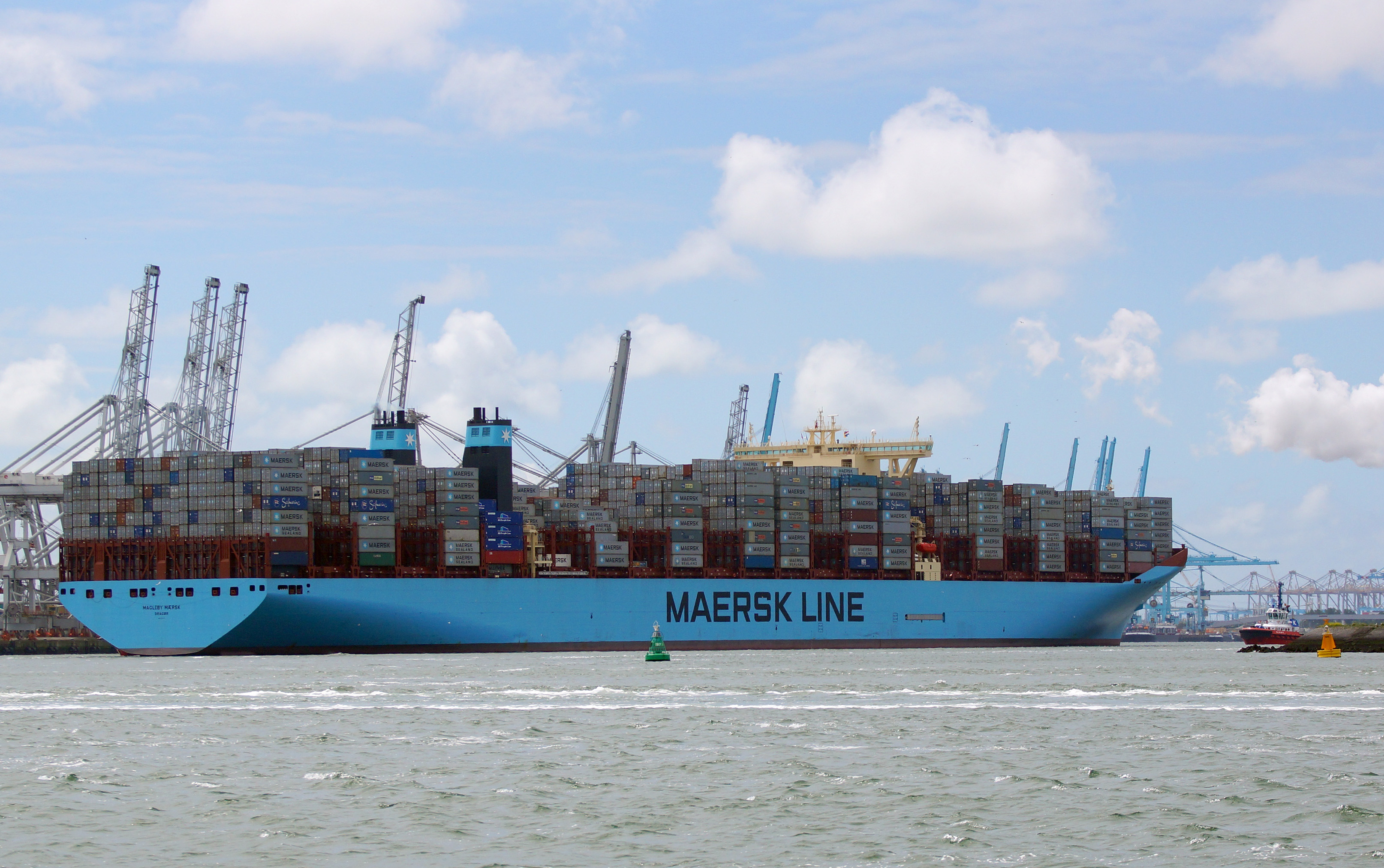 Magleby Maersk im Europoort Rotterdam.